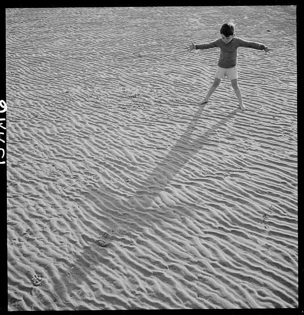 Foto van Toni Frissell die gepubliceerd werd in 'A child's garden of verses' van Robert Louis Stevenson. Een afdruk van deze foto maakt ook deel uit van Edward Steichen's 'The Family of Man'.